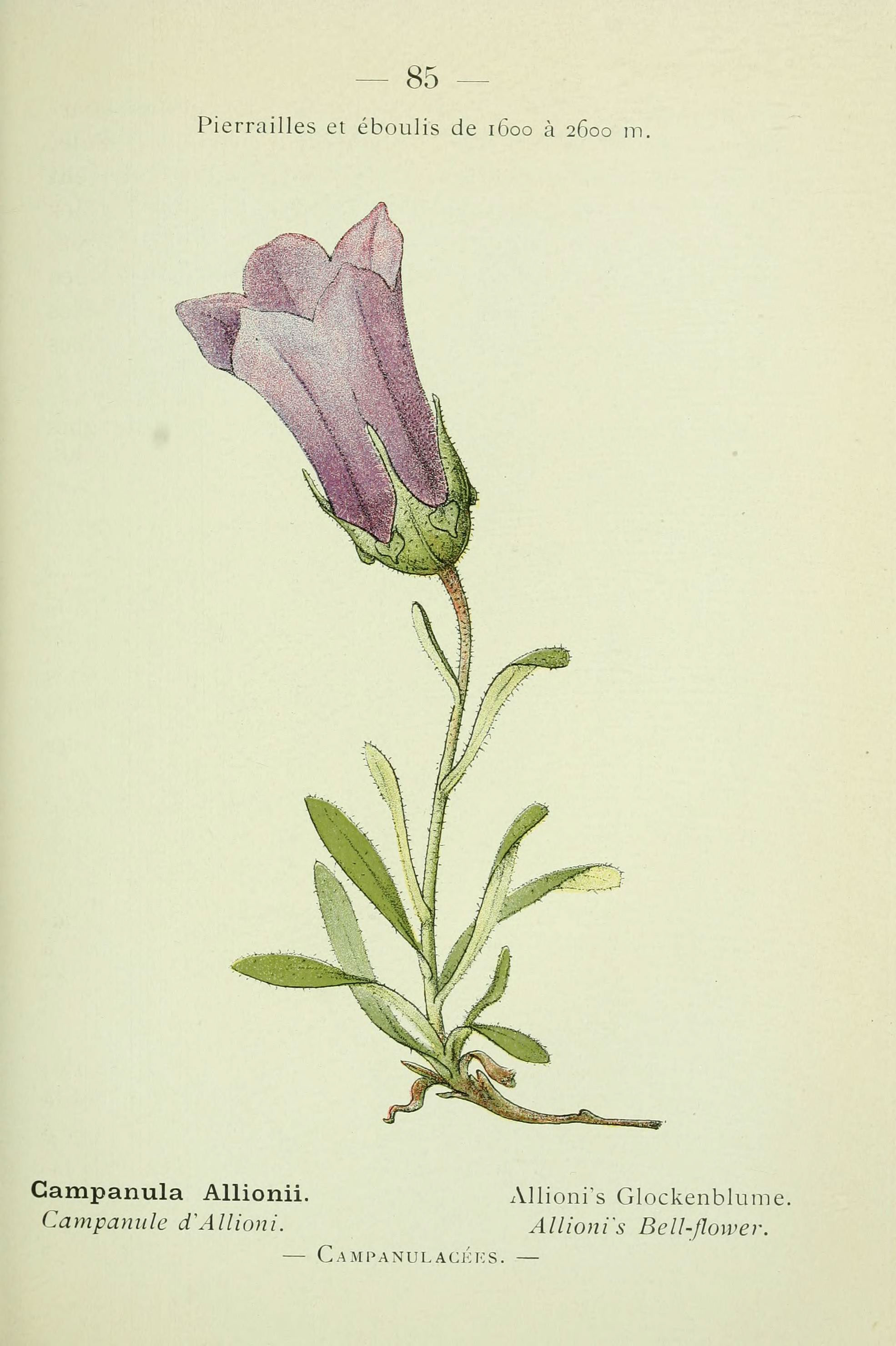 — 85 — Pierrailles et éboulis de 1600 à 2600 M^ Campanula Allionii. Allioni's Glockenblume. Campanule d'Allioni. Allioni's Bell-flower. — Campanulacj':ks. —